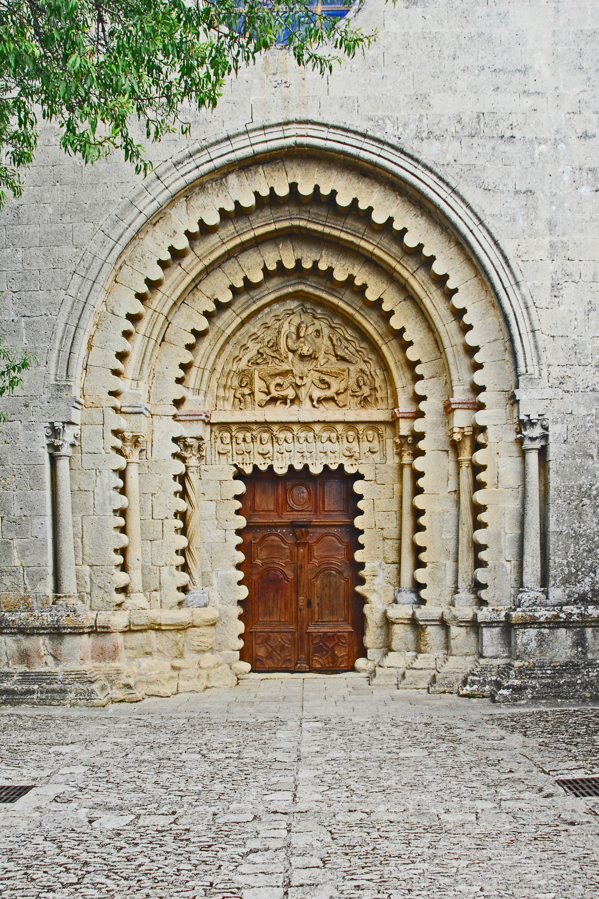 Prieuré de Ganagobie, Hauptpor6tal von W